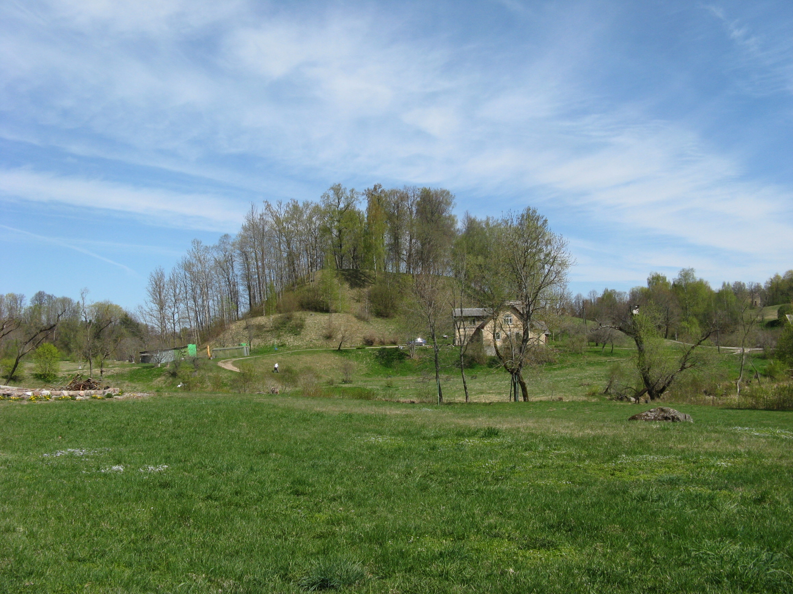 Tanīsa pilskalns Raunā